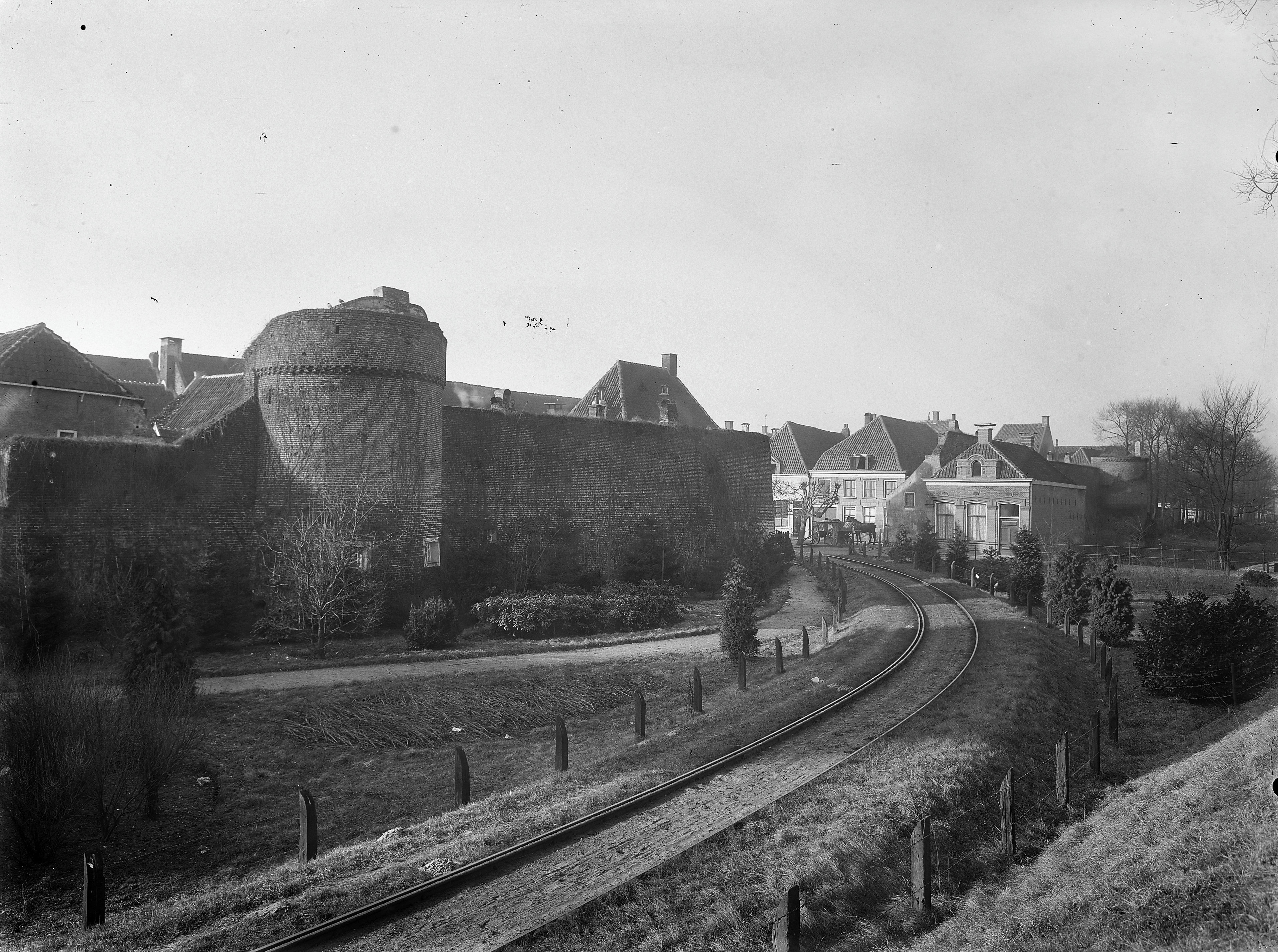 Stadsmuur: Zicht op gedeelte van de stadsmuur met halfronde muurtoren en spoorlijntje This is a possible Rijksmonument:Find the monument in the Monuments database:in ElburgAll Rijksmonumenten in ElburgIs this a Rijksmonument?YesNoMore information about this project and help. More images to work at in Category:Possible Rijksmonumenten.